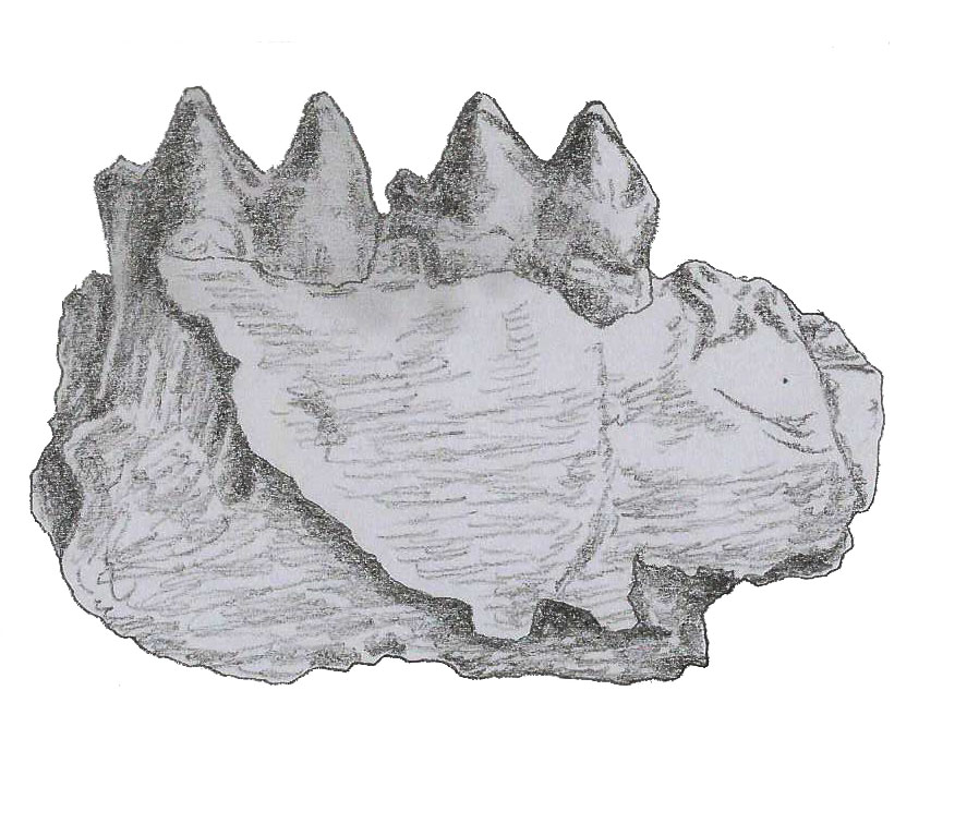 Mandible of Griphodon